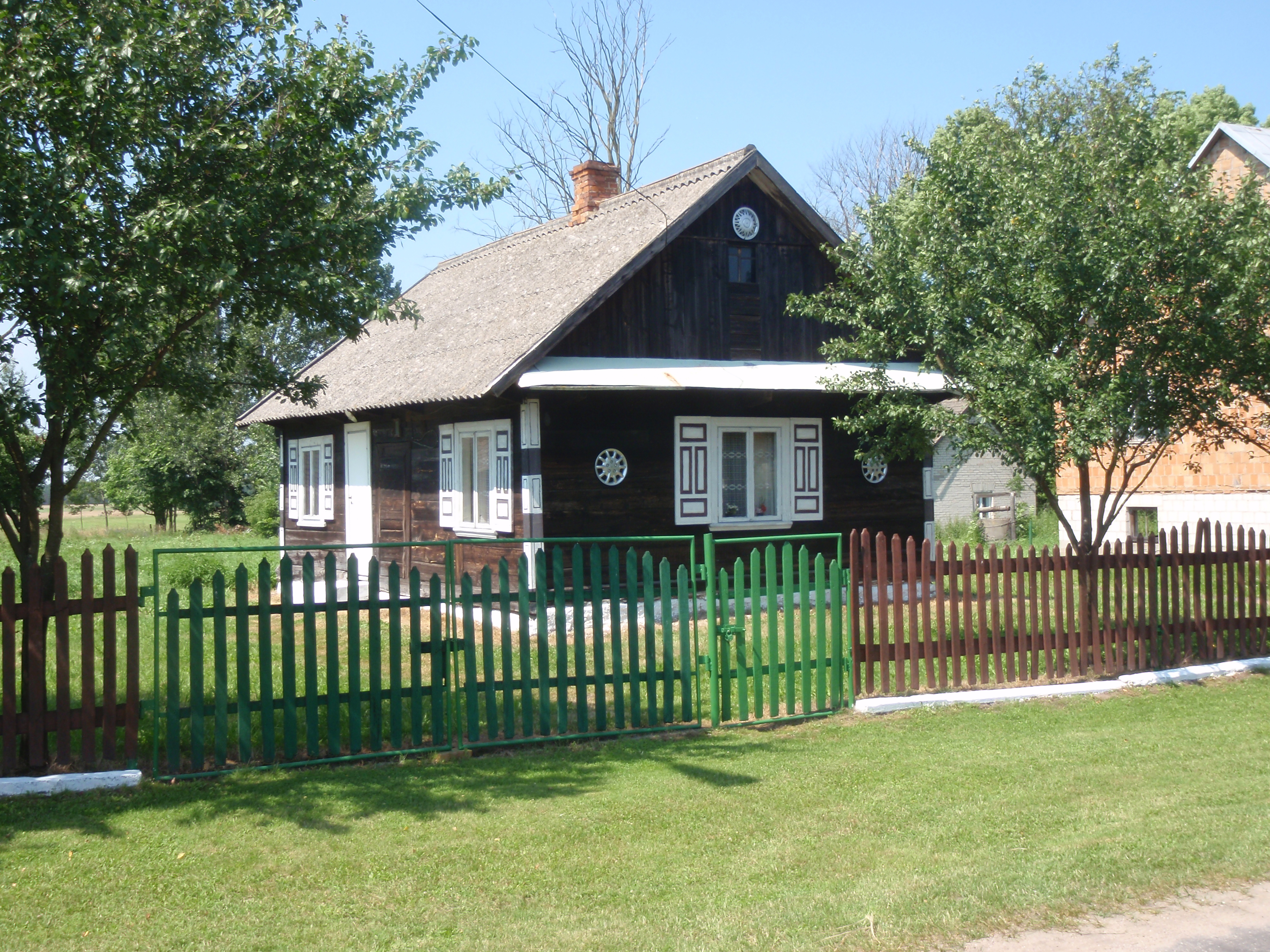 dom we wsi Kutowa ozdobiony plastykowymi kołpakami od kół samochodu osobowego - współczesny odpowiednik ozdabiania domu kołami wozowymi